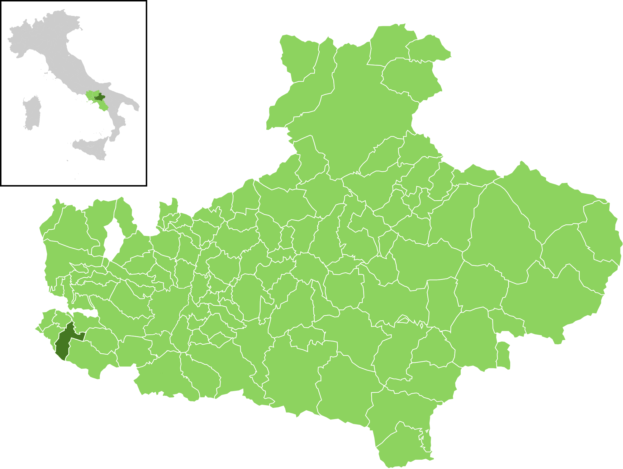 Il comune all'interno della provincia di Avellino